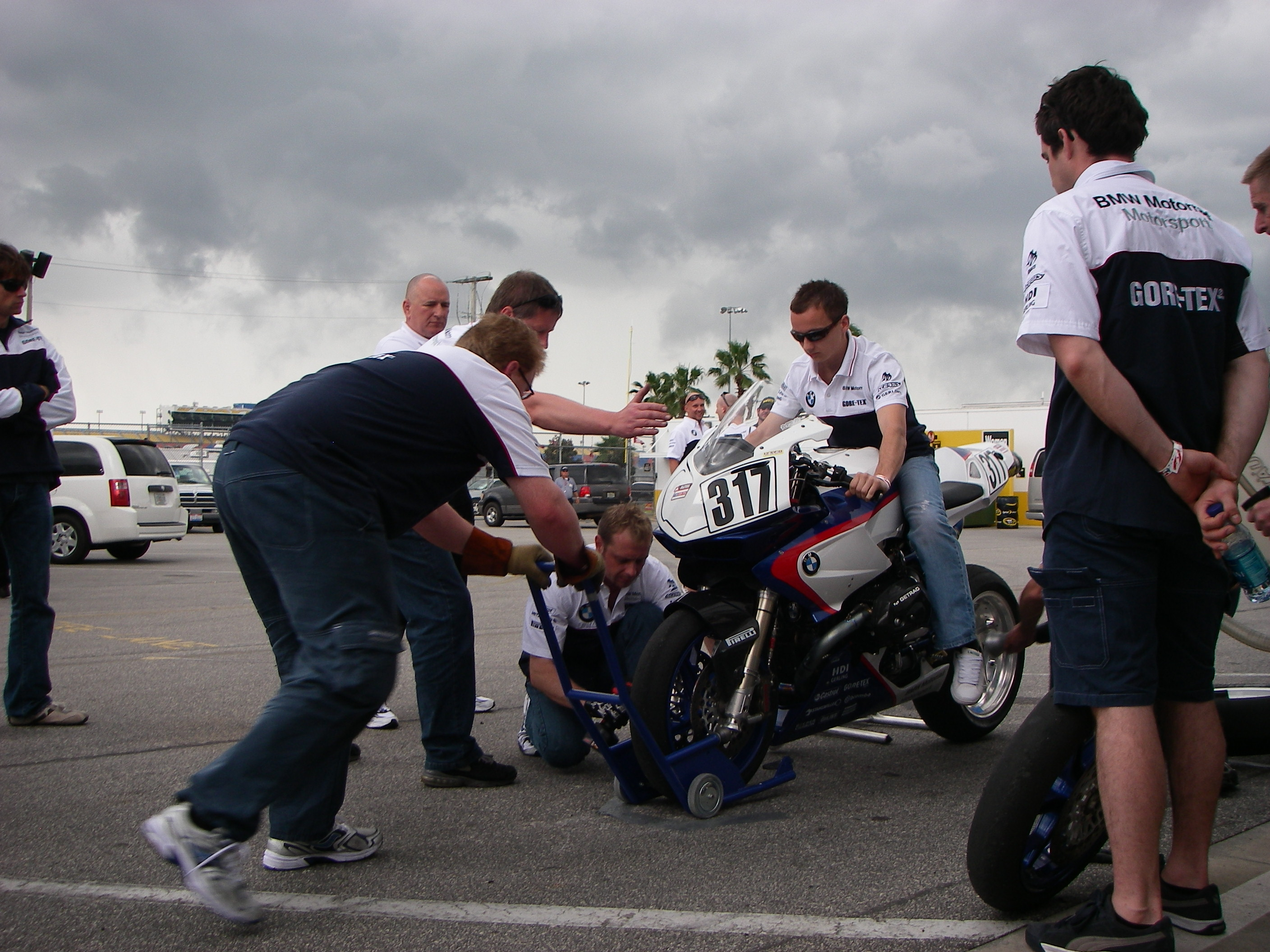 Training Boxenstop Daytona